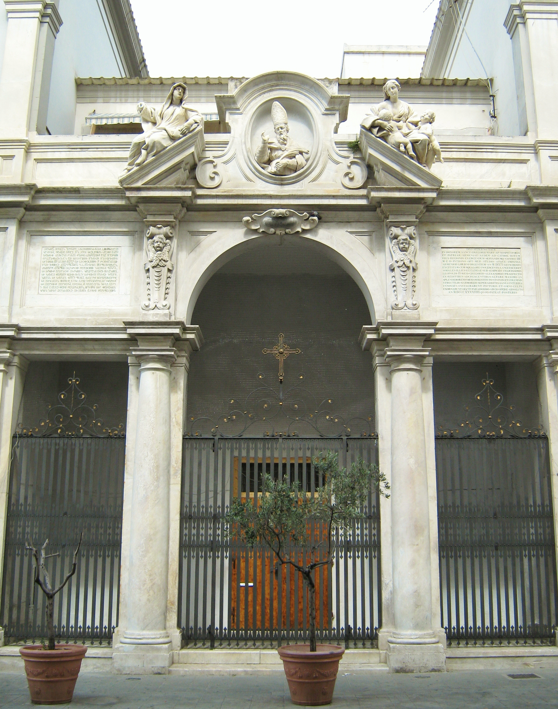 Livorno, facciata della chiesa di San Gregorio Illuminatore dopo il restauro e il rifacimento della cancellata.